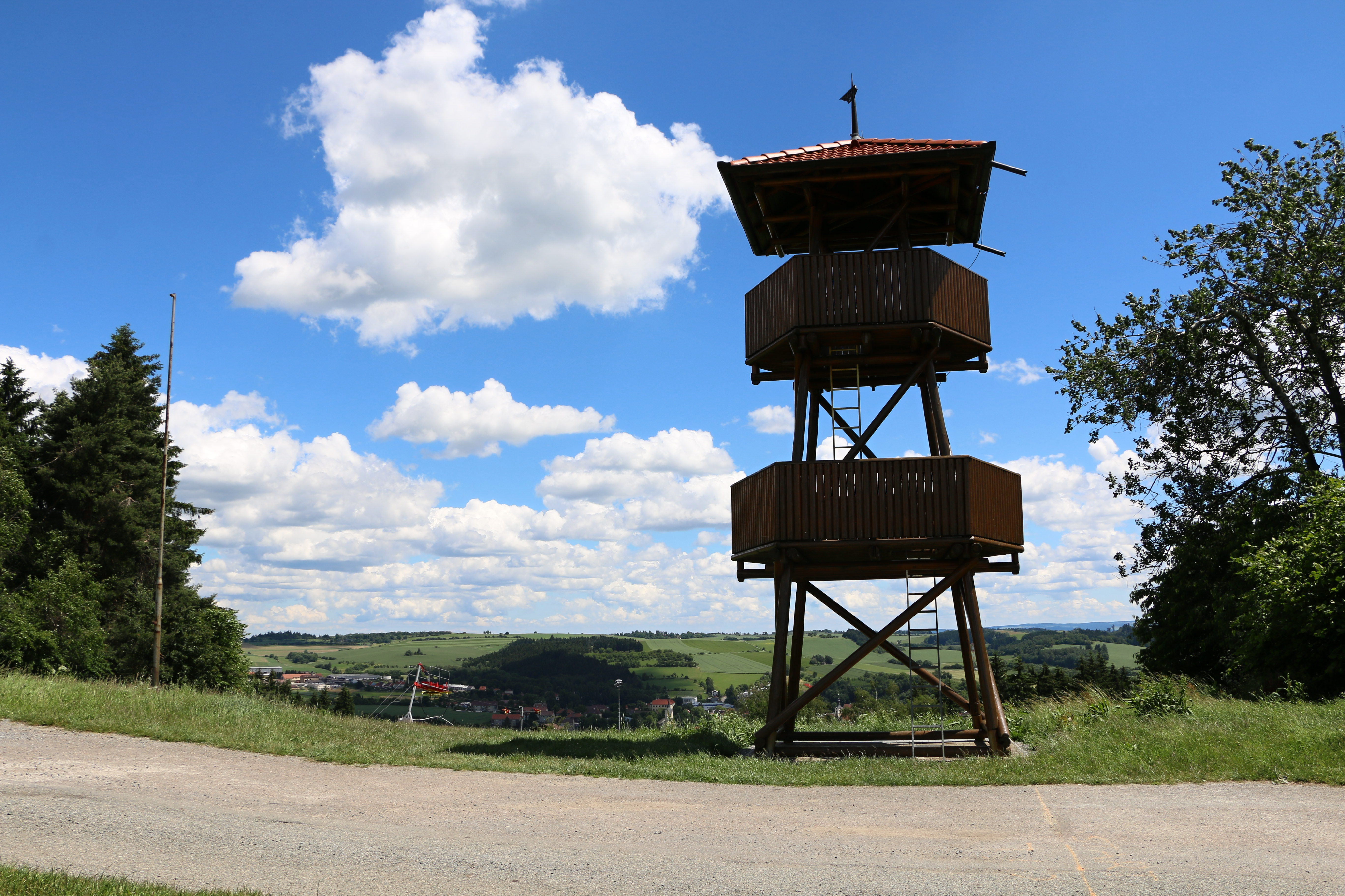 Olešnice (rozhledna) z 18.6.2016